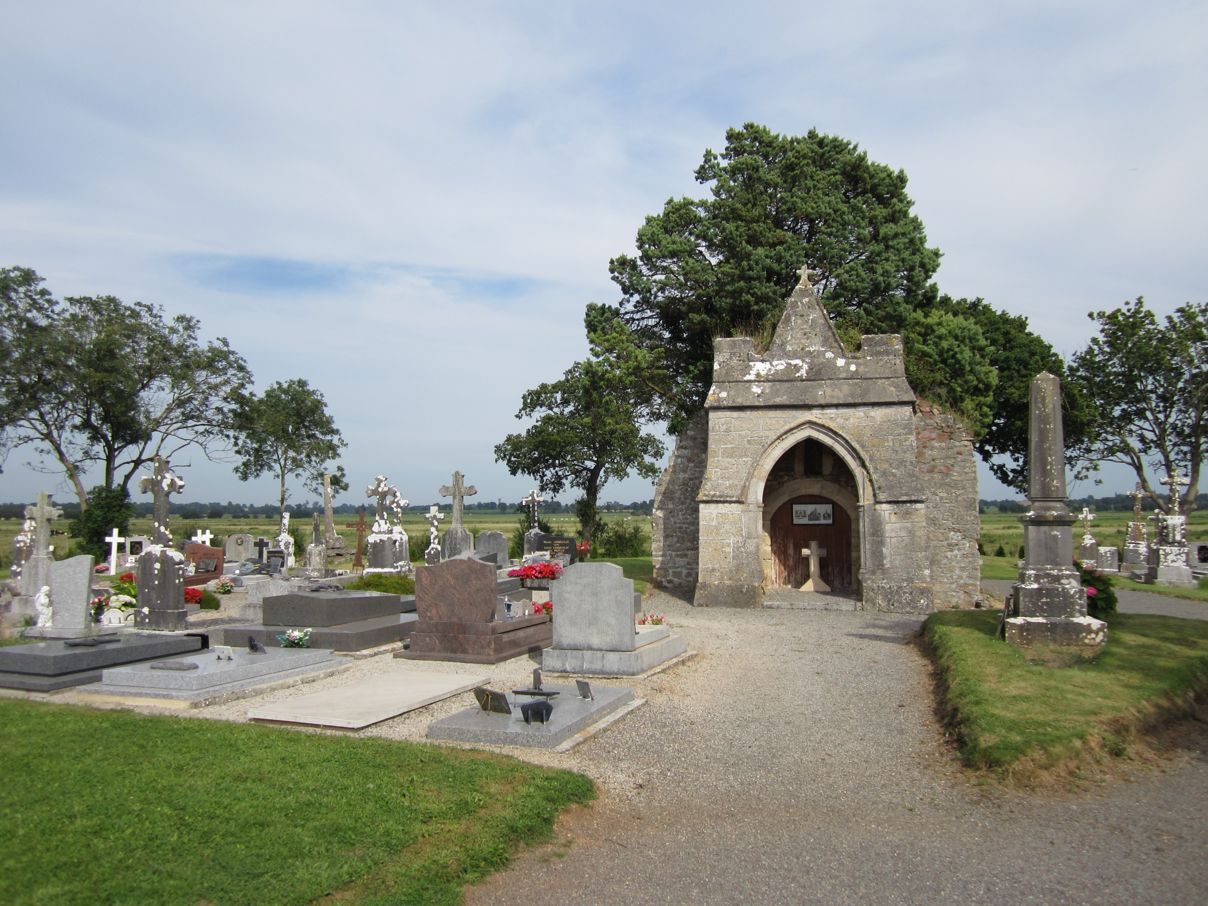 ancienne église de Nay (Manche)